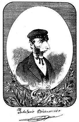 Indalezio Bizkarrondo Bilintx